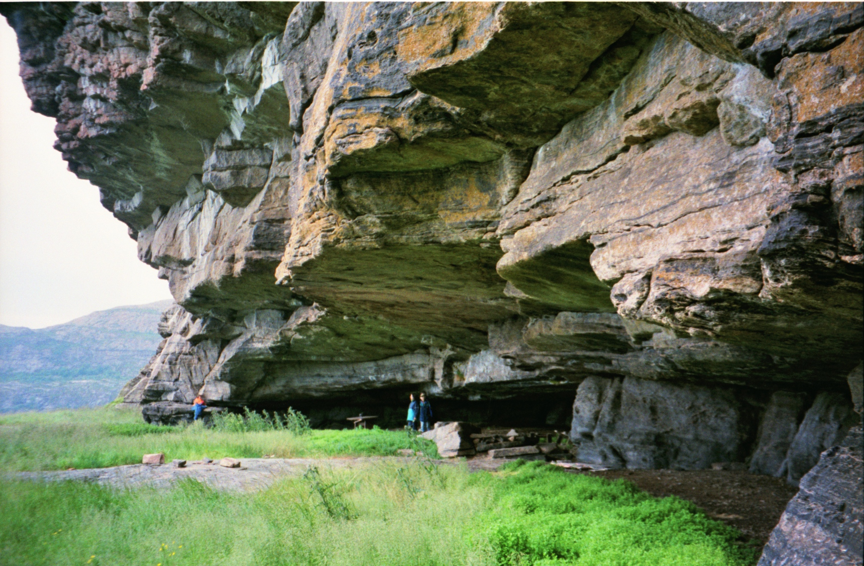 En heller ved Harbakk, Åfjord